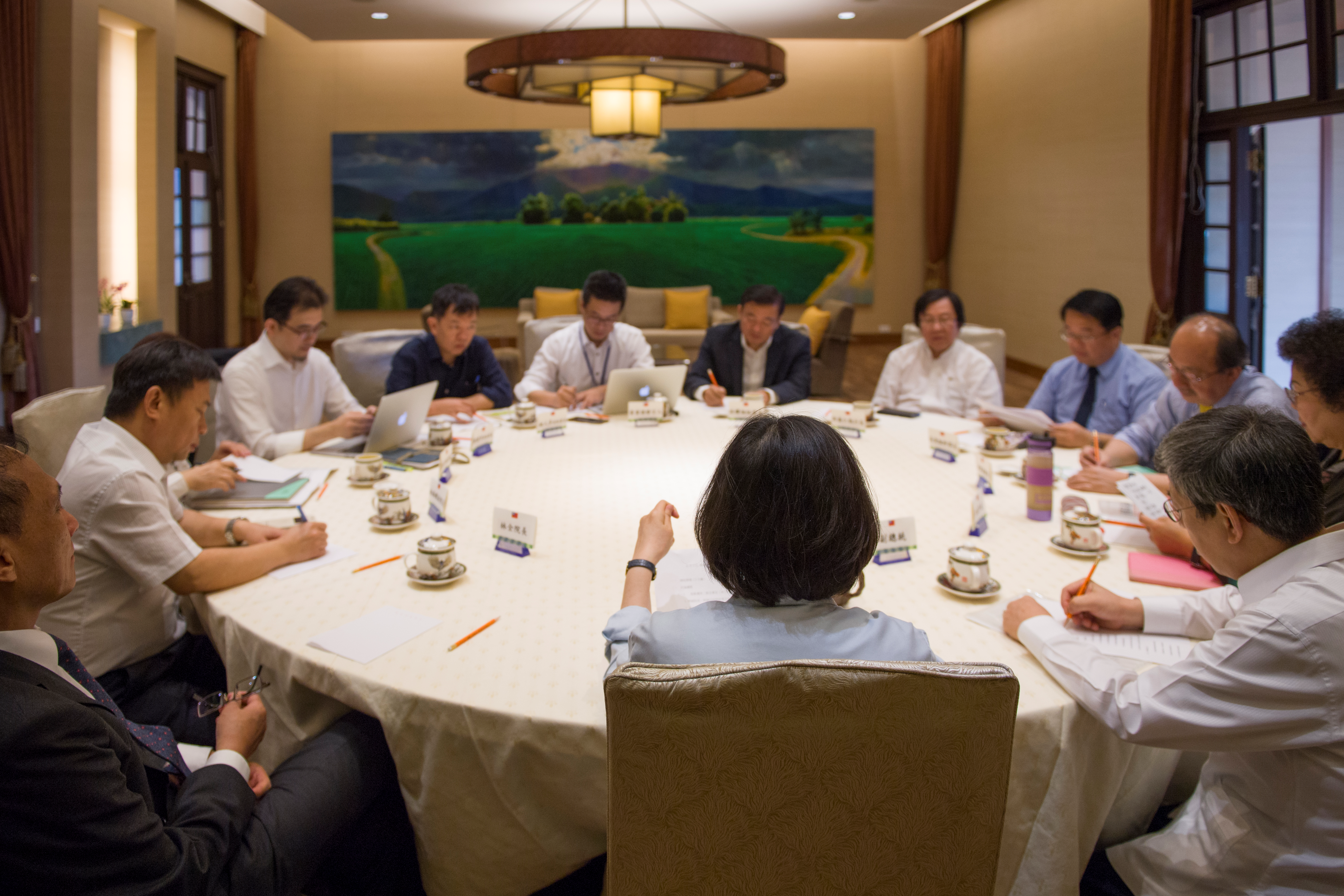 中華民國總統蔡英文在總統府召開首次「執政決策協調會議」，出席者：蔡英文、林全、林錫耀、陳美伶、劉建忻、姚人多、黃重諺、洪耀福、邱義仁、吳秉叡、柯建銘、陳菊、陳建仁。